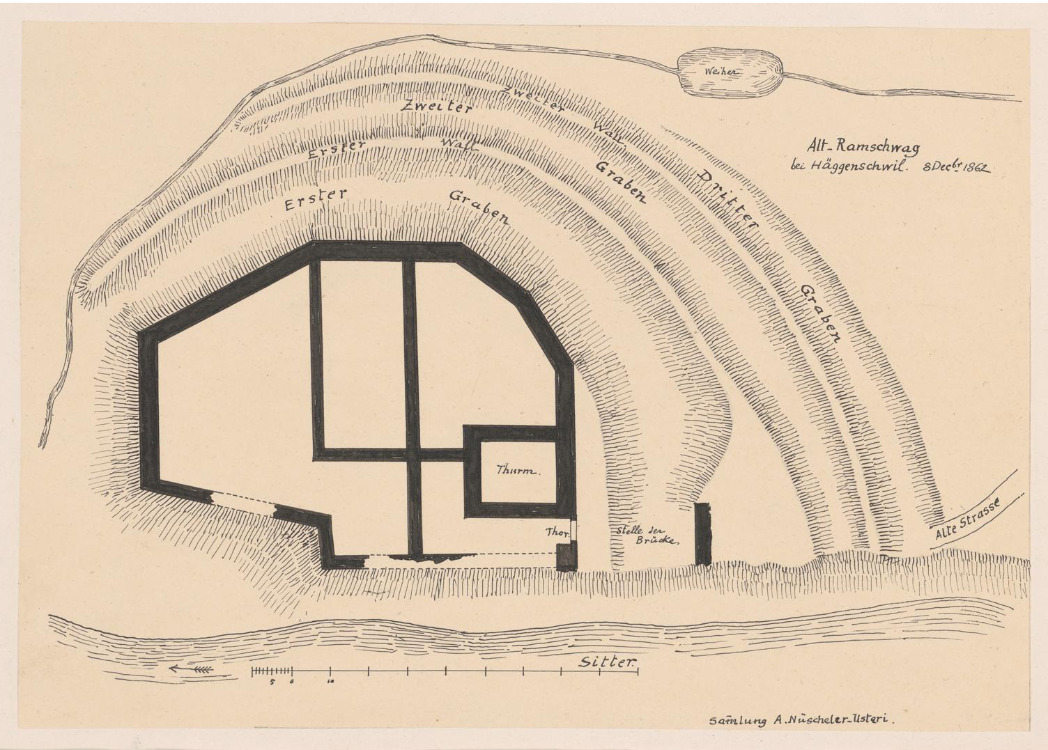 Grundriss Ruine Alt-Ramschwag, Zeichnung, Feder und Pinsel in Schwarz, Bild und Blatt 19,1 x 27,6 cm, Unterlage 23,7 x 32,4 cm